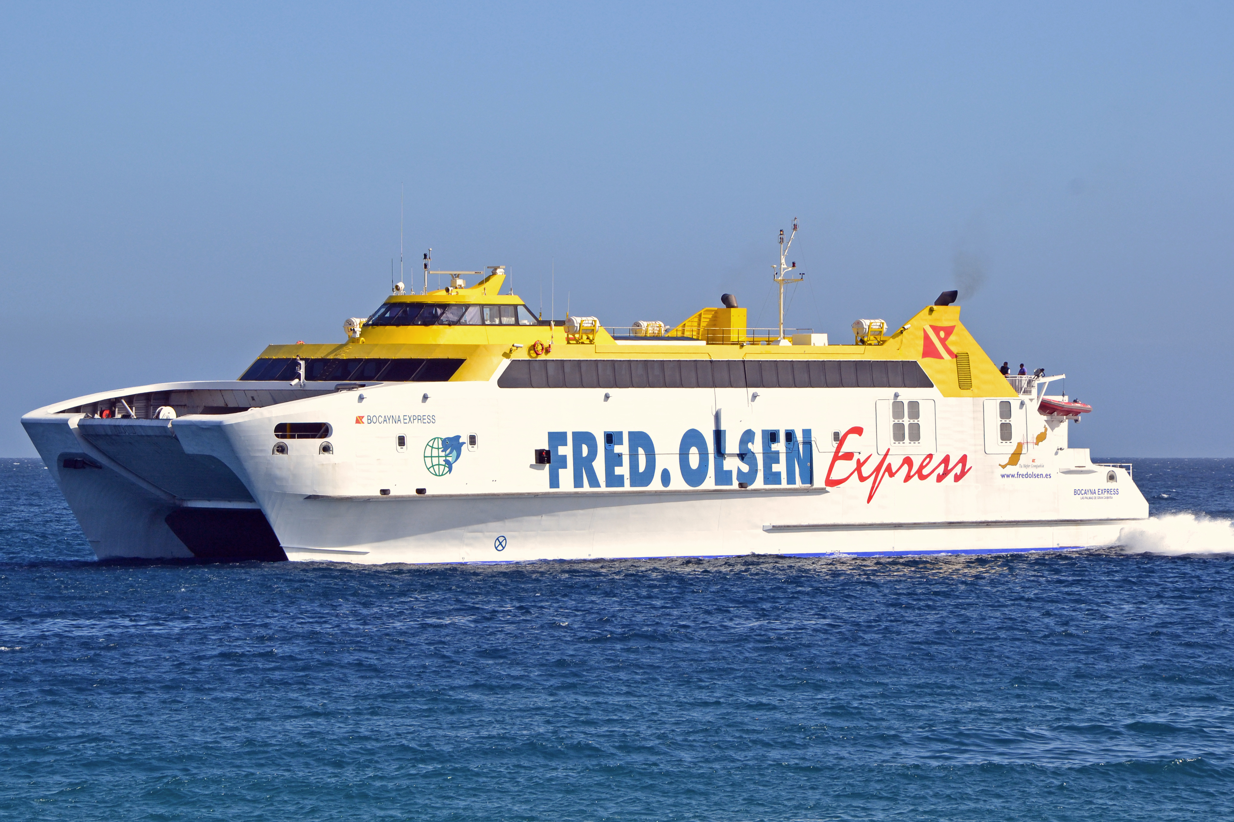 Das Fährschiff Bocayna Express - verkehrt zwischen den Kanarischen Inseln Lanzarote (Playa Blanca) und Fuerteventura (Corralejo)